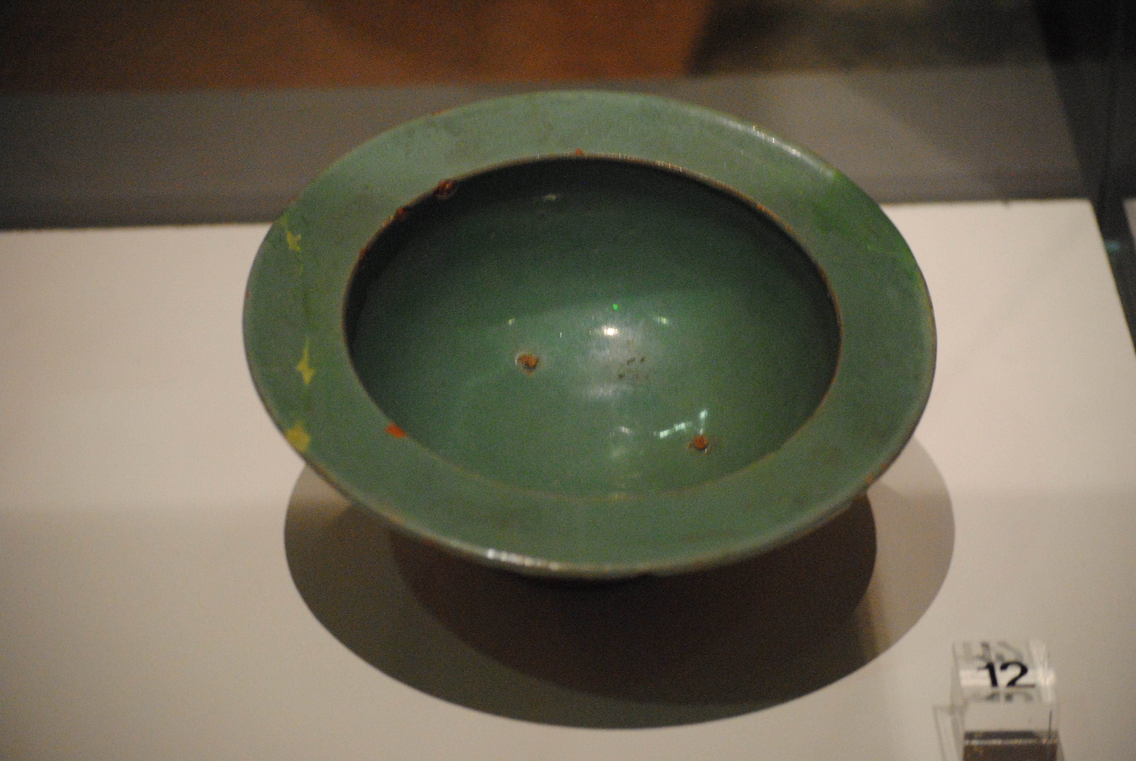 Scodella inmaiolica arcaica (smaltata in verde) di produzione pisana risalente alla fine del XIII - inizi del XIV secolo, usata come bacino cermaico (chiesa di San Martino) - Museo nazionale di San Matteo.